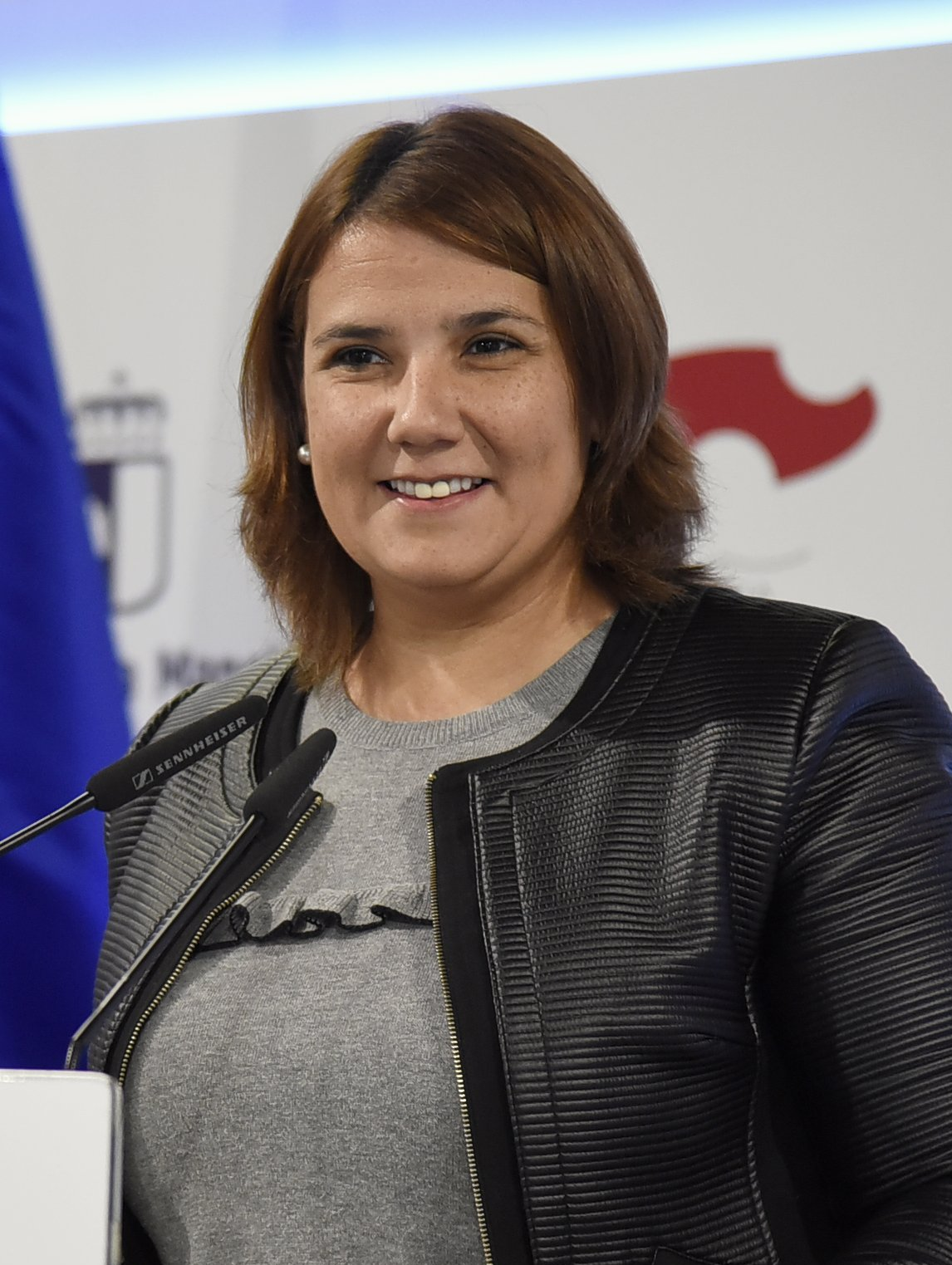 TOLEDO, 6 de noviembre de 2018.- La consejera de Fomento, Agustina García Élez, ofrece, en el Palacio de Fuensalida, una rueda de prensa para informar de los asuntos del Consejo de Gobierno relacionados con su departamento. (Fotos: José Ramón Márquez // JCCM)